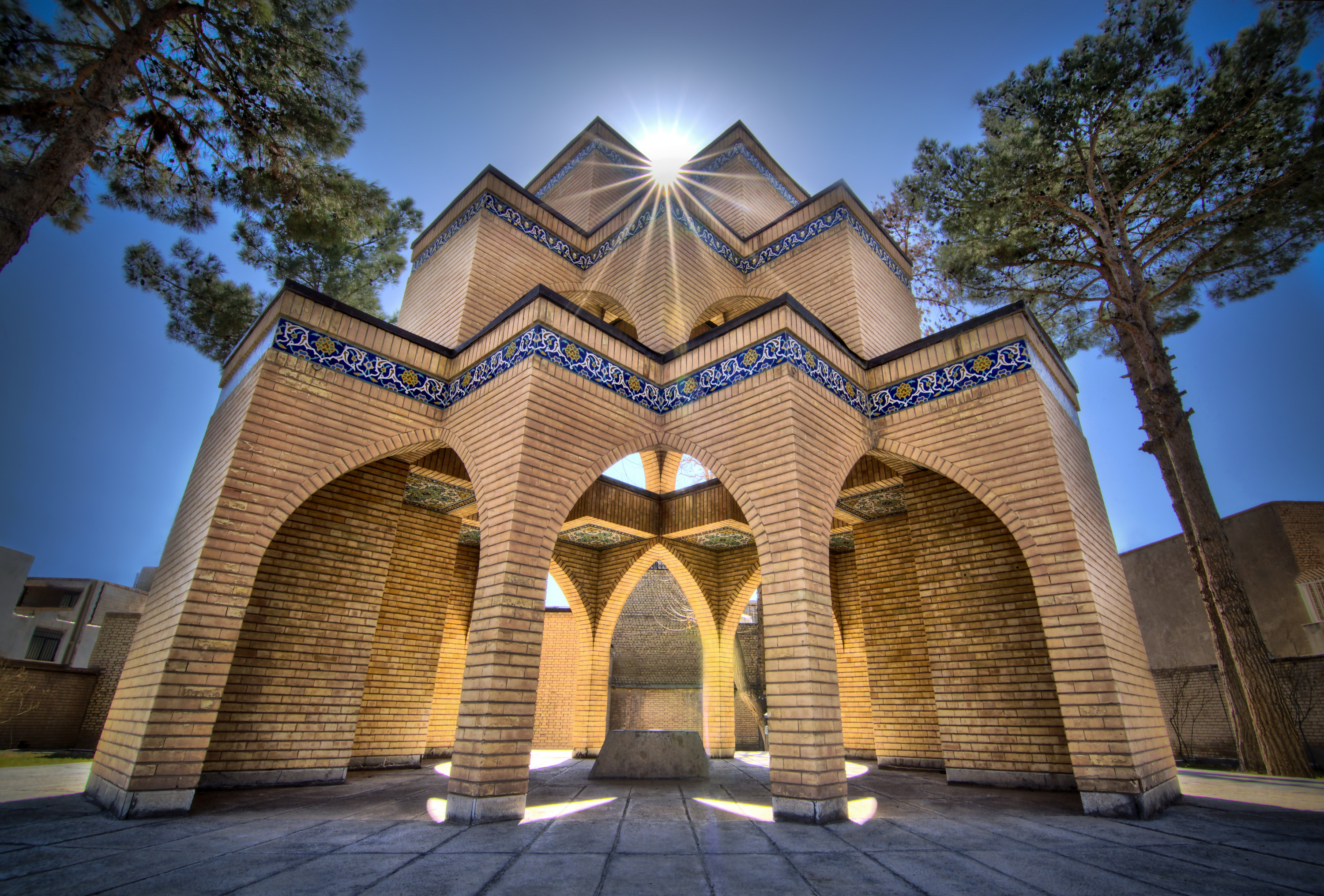 بنای یادبود ملاحسین کاشفی